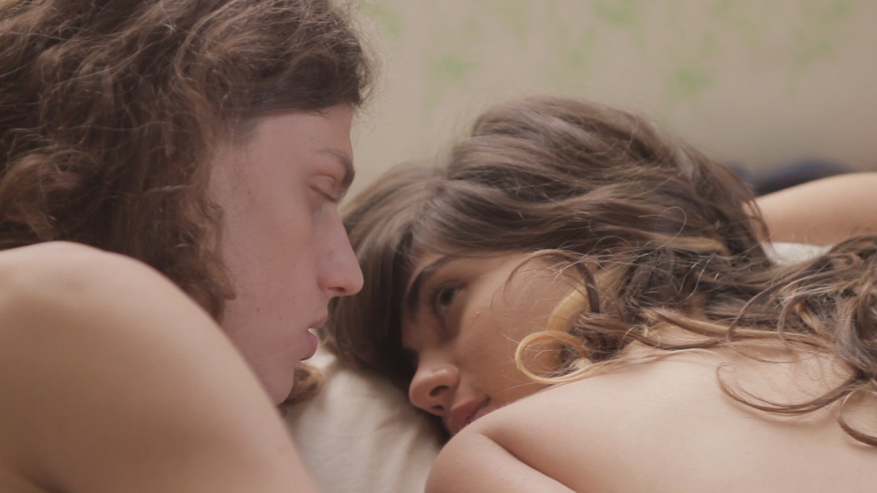 נעה וברק פרידמן